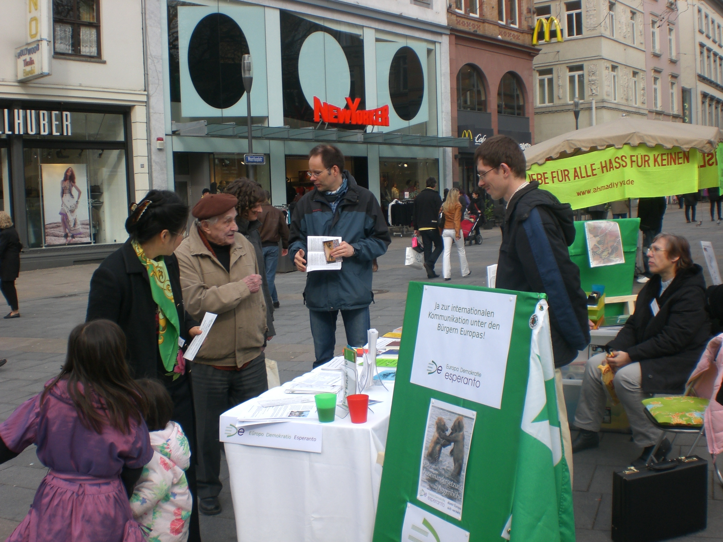 Informstando de EDE en Wiesbaden